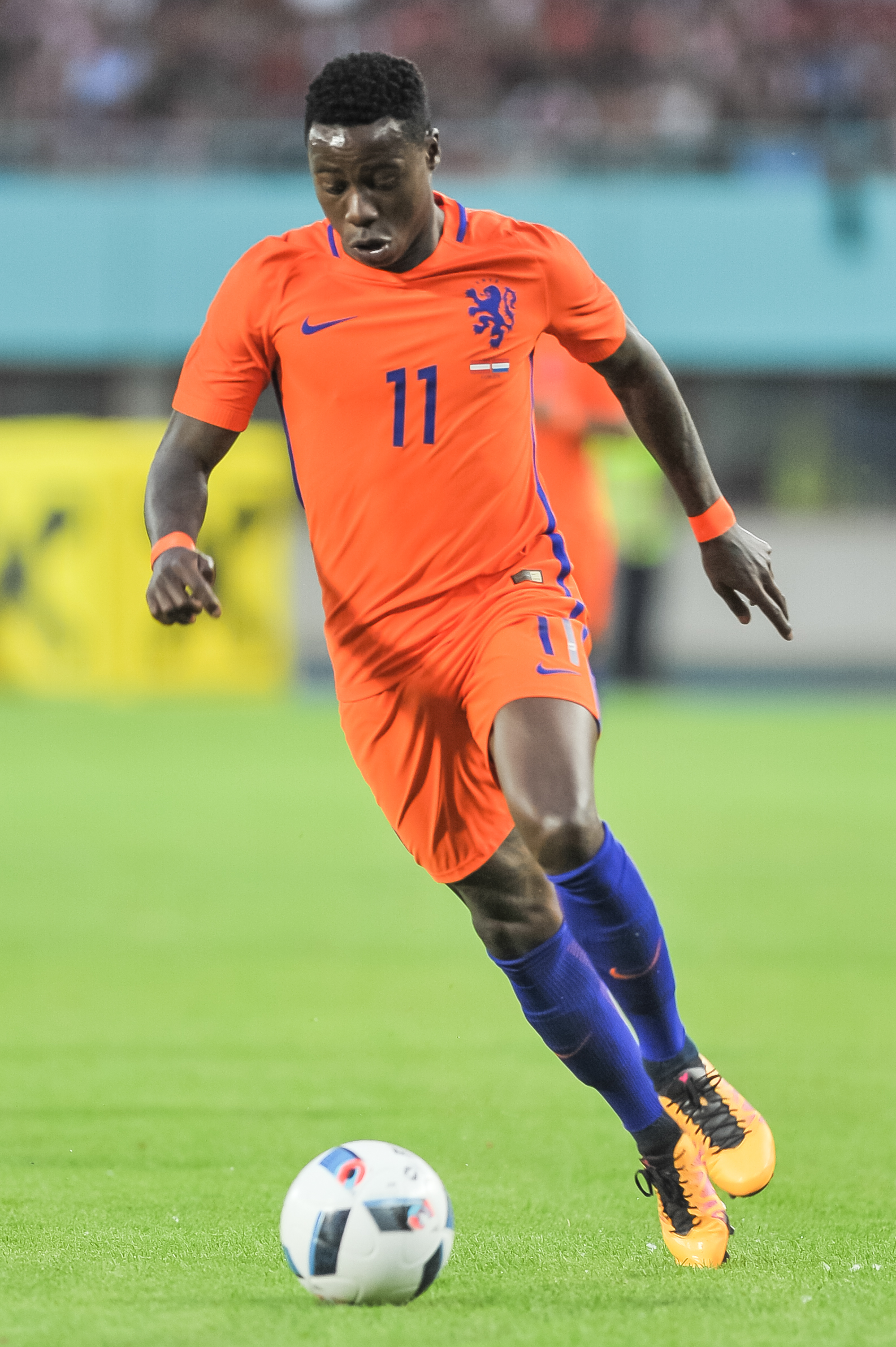 Wien, 4.6.2016, ÖFB Laenderspiel - Österreich vs Niederlande. Bild zeigt Quincy Promes (NED).